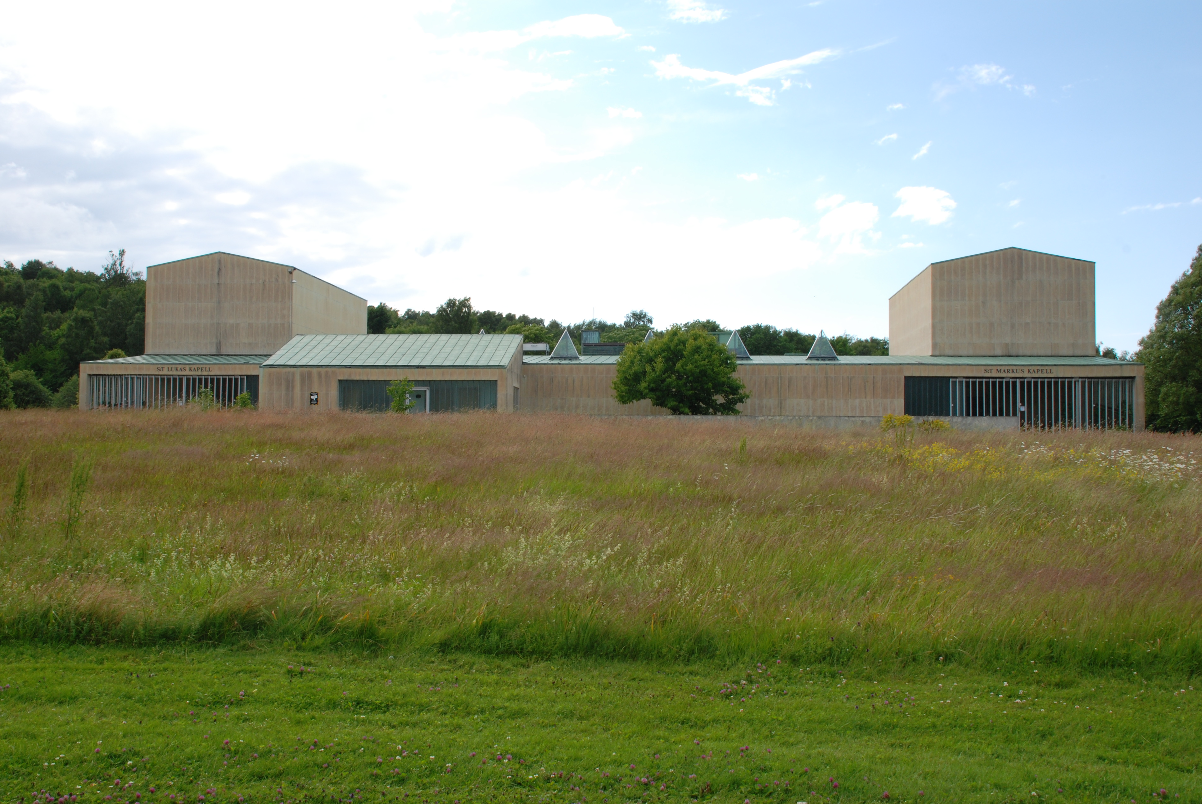 Sankt Lukas och Sankt Markus kapell på Västra kyrkogården i Göteborg. Ritade av Sven Brolid.